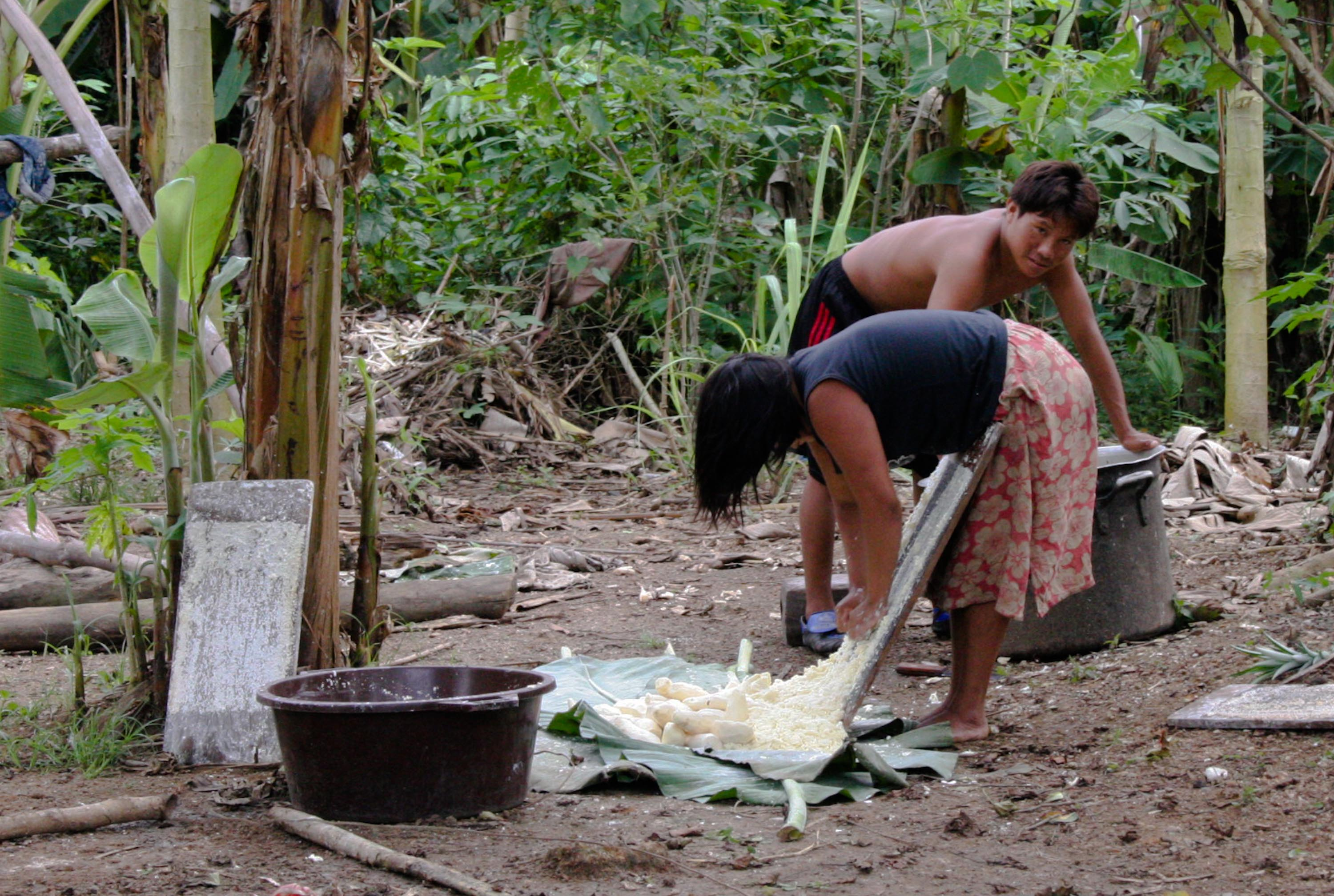 Proceso de rayado de yuca. Comunidad indigena Sanama, Rio Caura, Estado Bolivar, Venezuela